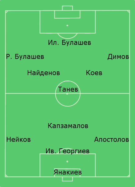 Съставът на Шипченски сокол във финала на държавното първенство срещу Славия, игран на 18 септември 1932 г.